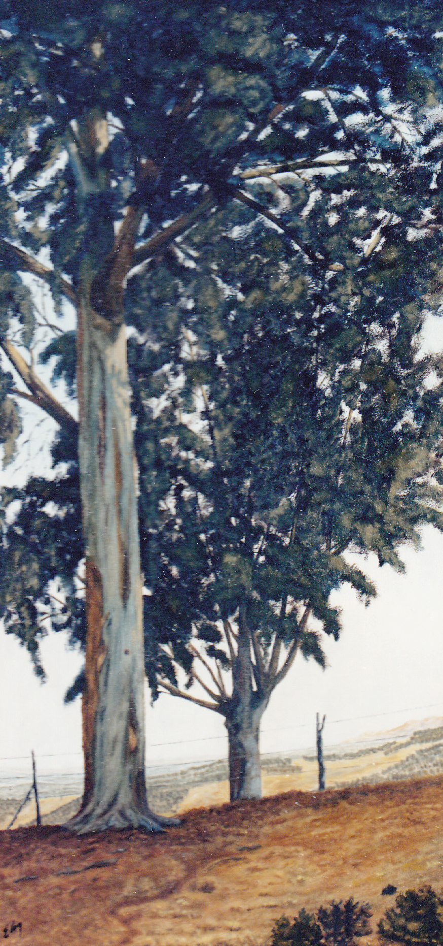 Pintura de Eugenio Cruz Vargas (1923 - 2014). Técnica: óleo sobre tela. Tema: árboles eucaliptus en zona costera de la región de Valparaíso, Chile. Medidas: 125 x 50 cm. Autora de la fotografía: Liliana Fuentes, quien por el consentimiento del propietario titular de los derechos de autor de la obra, publica esta fotografía en internet bajo la Licencia de Uso Creative Commons, Atribución-Compartigual 3.0 Unported (CC BY-SA 3.0).